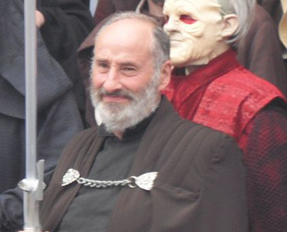 Version paysage de la photo de Dooku